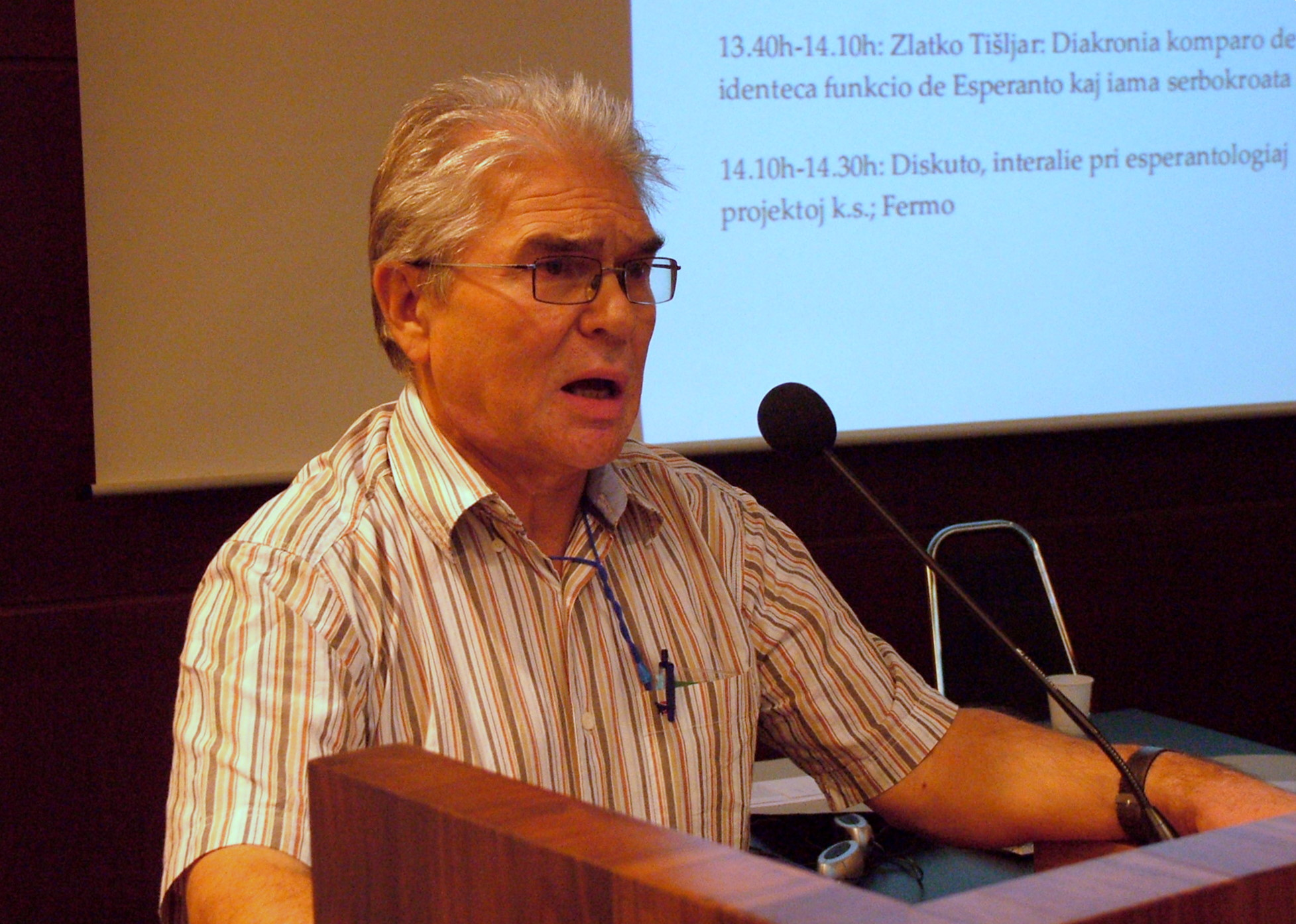 Universala Kongreso de Esperanto, Roterdamo 2008. Esperantologia Konferenco, parolas Zlatko Tishljar.